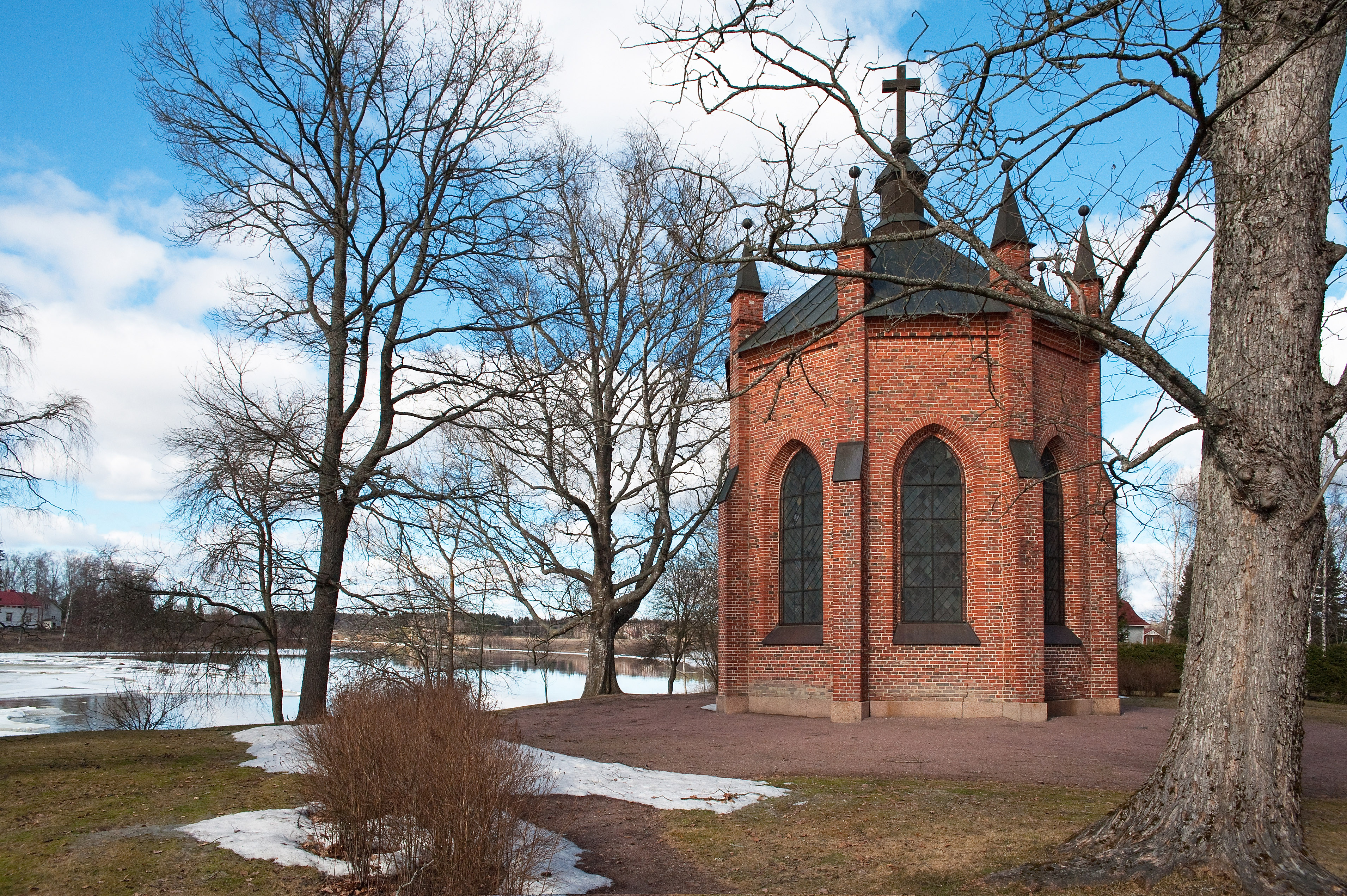 Pyhän Henrikin kappeli huhtikuussa 2011.